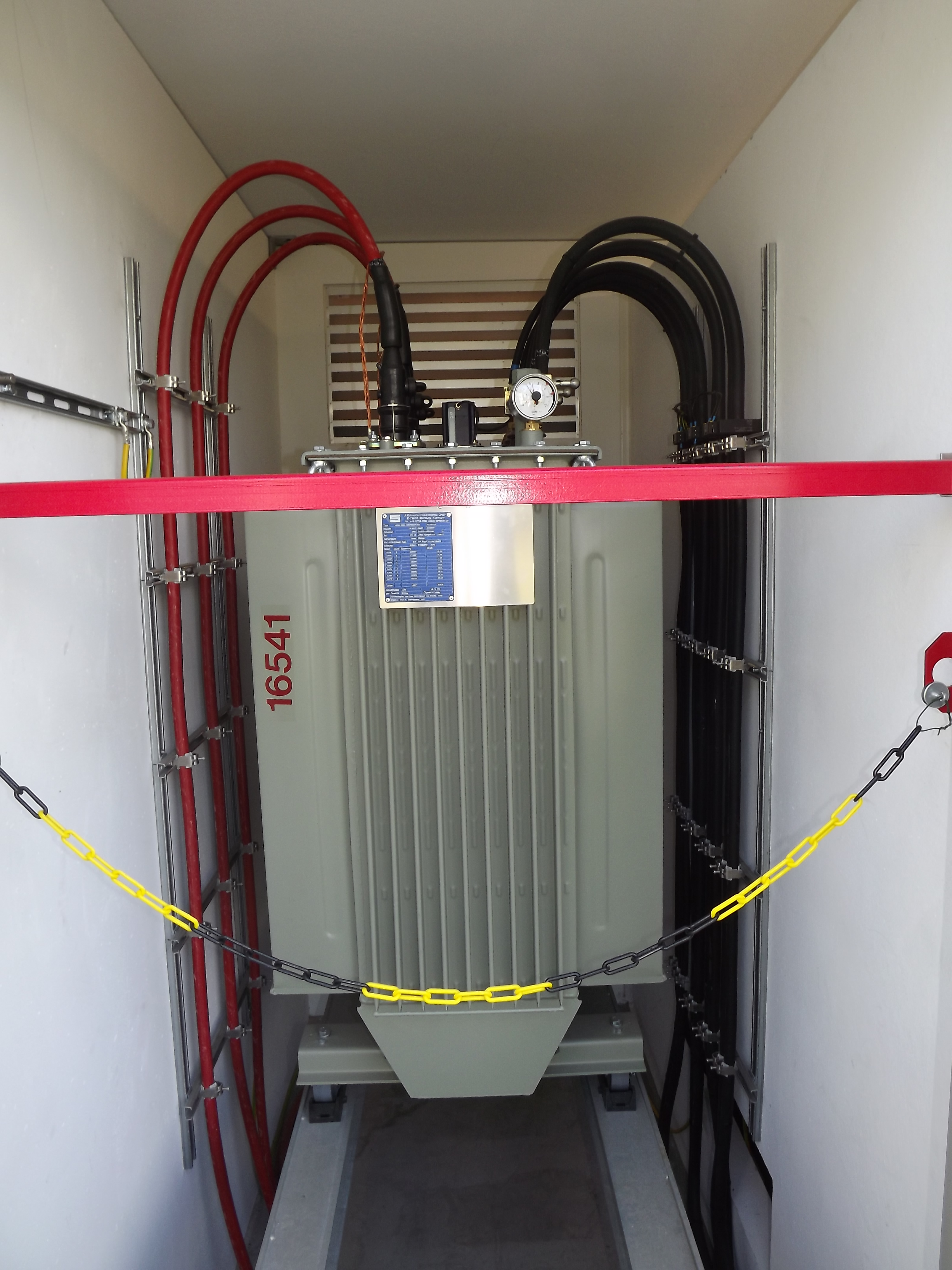 Das Bild zeigt einen regelbaren Ortsnetztransformator (RONT) in einer Kompaktstation in der Stadt Schwabmünchen. Von links erfolgt die Zuführung der Hochspannungsleitungen, nach rechts gehen die Niederspannungsleitungen ab. Sie weisen wegen der größeren Stromstärke auf der Sekundärseite einen größeren Querschnitt auf. Dieser Transformator ist mit einer Regelungseinheit versehen, die in mehreren Stufen die Sekundärspannung anheben oder absenken kann, um auf Spannungsschwankungen reagieren zu können. Bei diesem Model, das von der Maschinenfabrik Reinhausen stammt, kann die Regelungseinheit auch über eine remote Steuerung angesprochen werden.